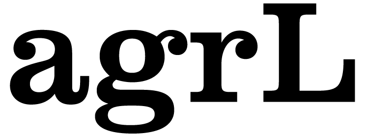 AgrLClarendon